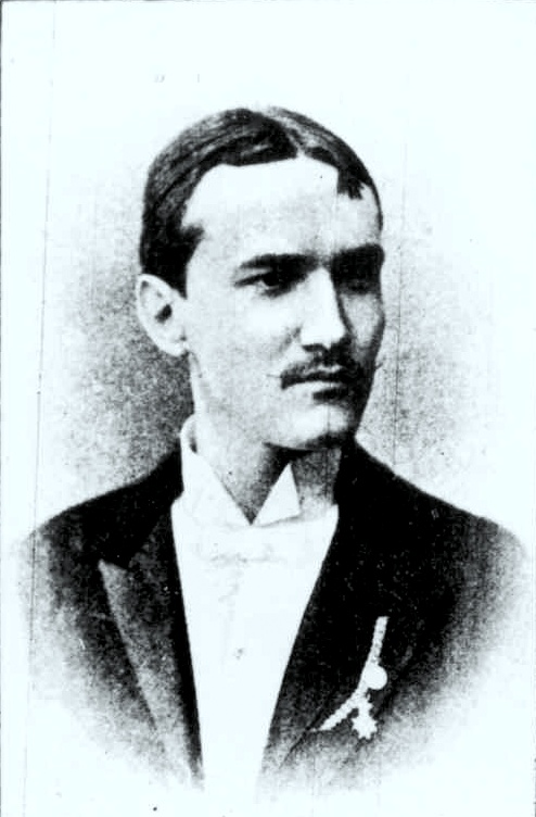 Sozialreformer und Erbauer der "Schule-Kolonie" in Preßburg